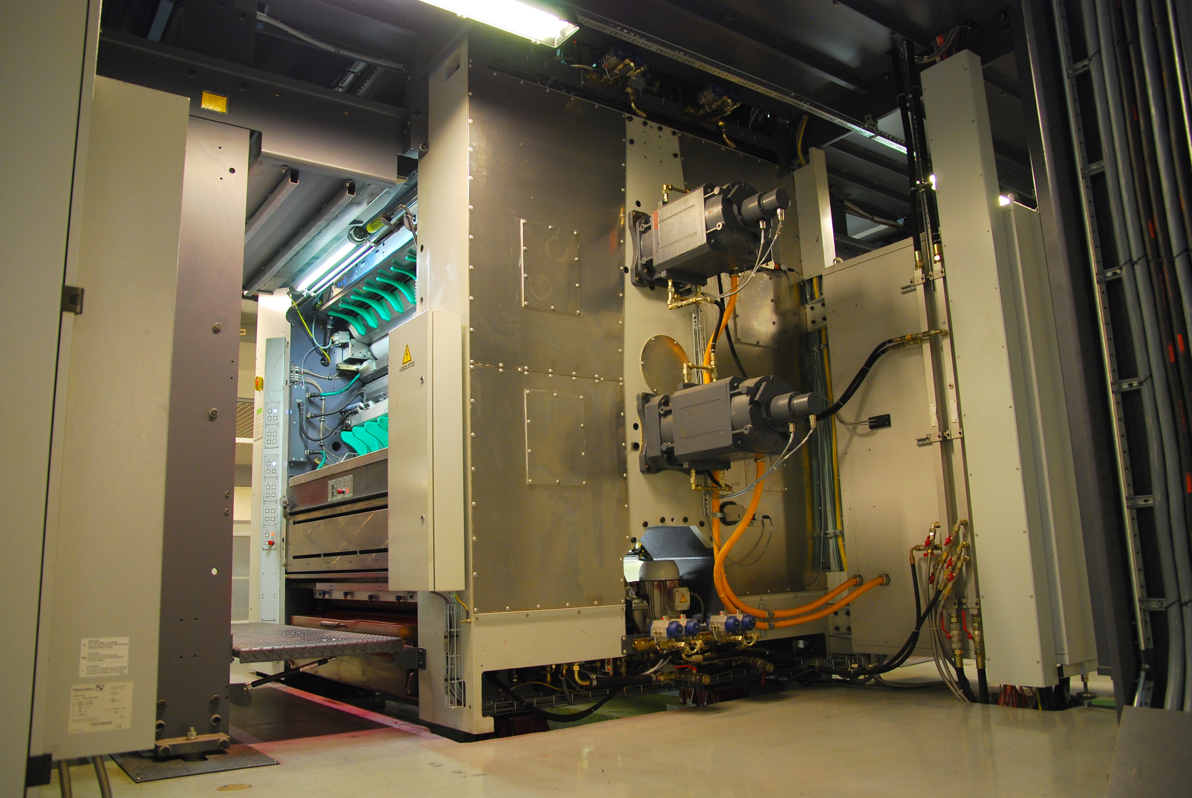 Offsetowa maszyna drukarska "Dziennika Zachodniego" w Sosnowcu